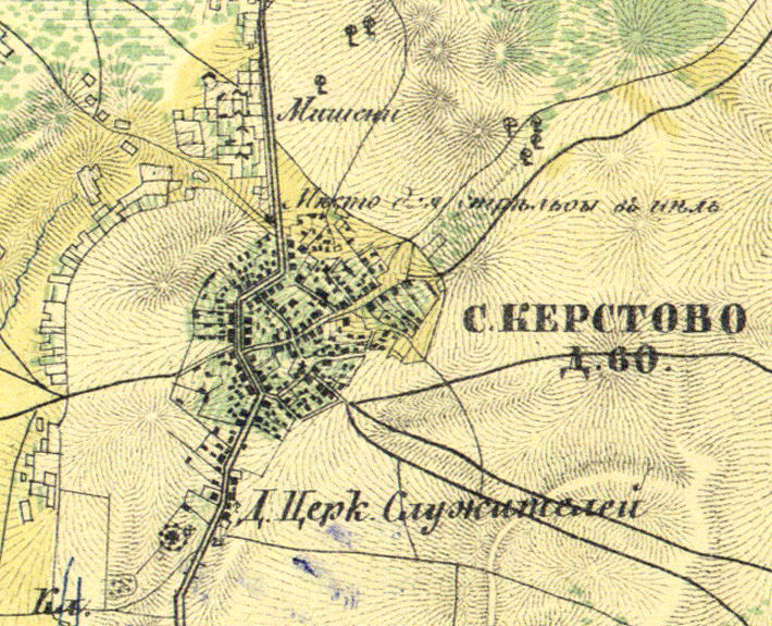 Село Керстово на карте 1860 года.